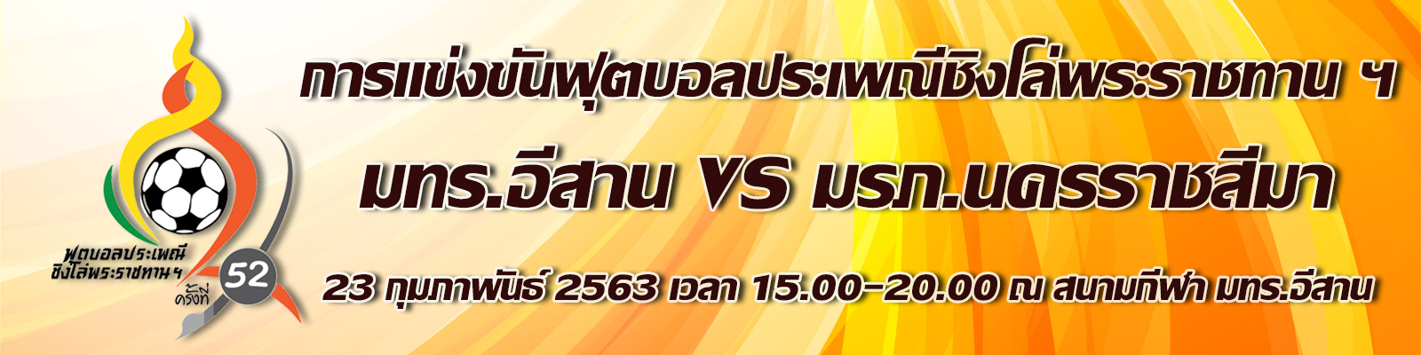 ป้ายประชาสัมพันธ์งานครั้งที่ 52